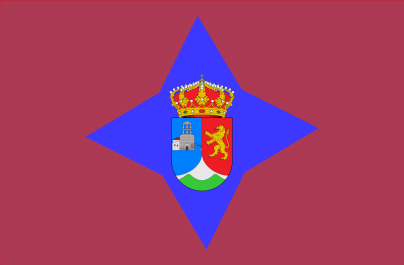 bandera del municipio de Anievas